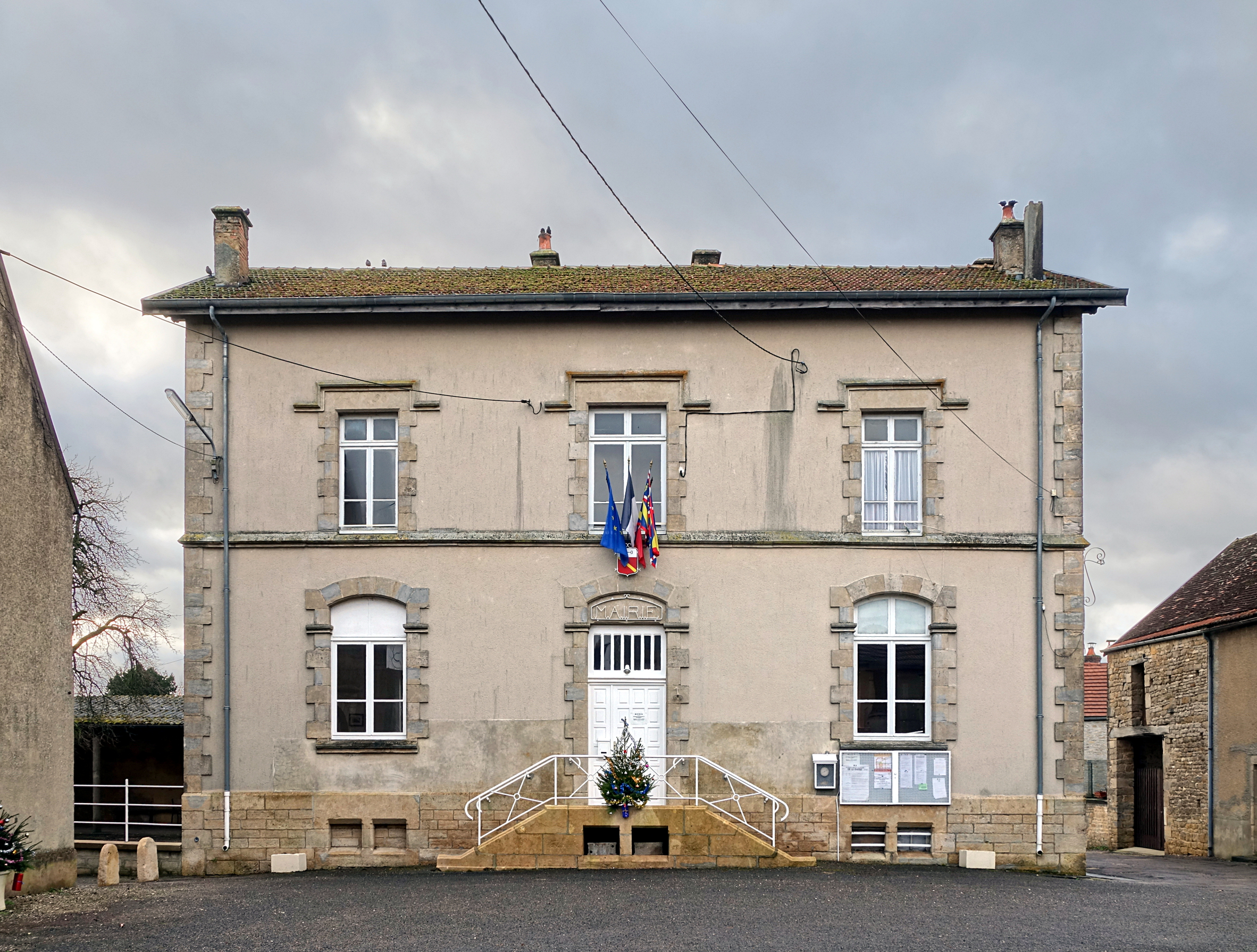 La mairie de Sennevoy-le-Bas (Yonne).